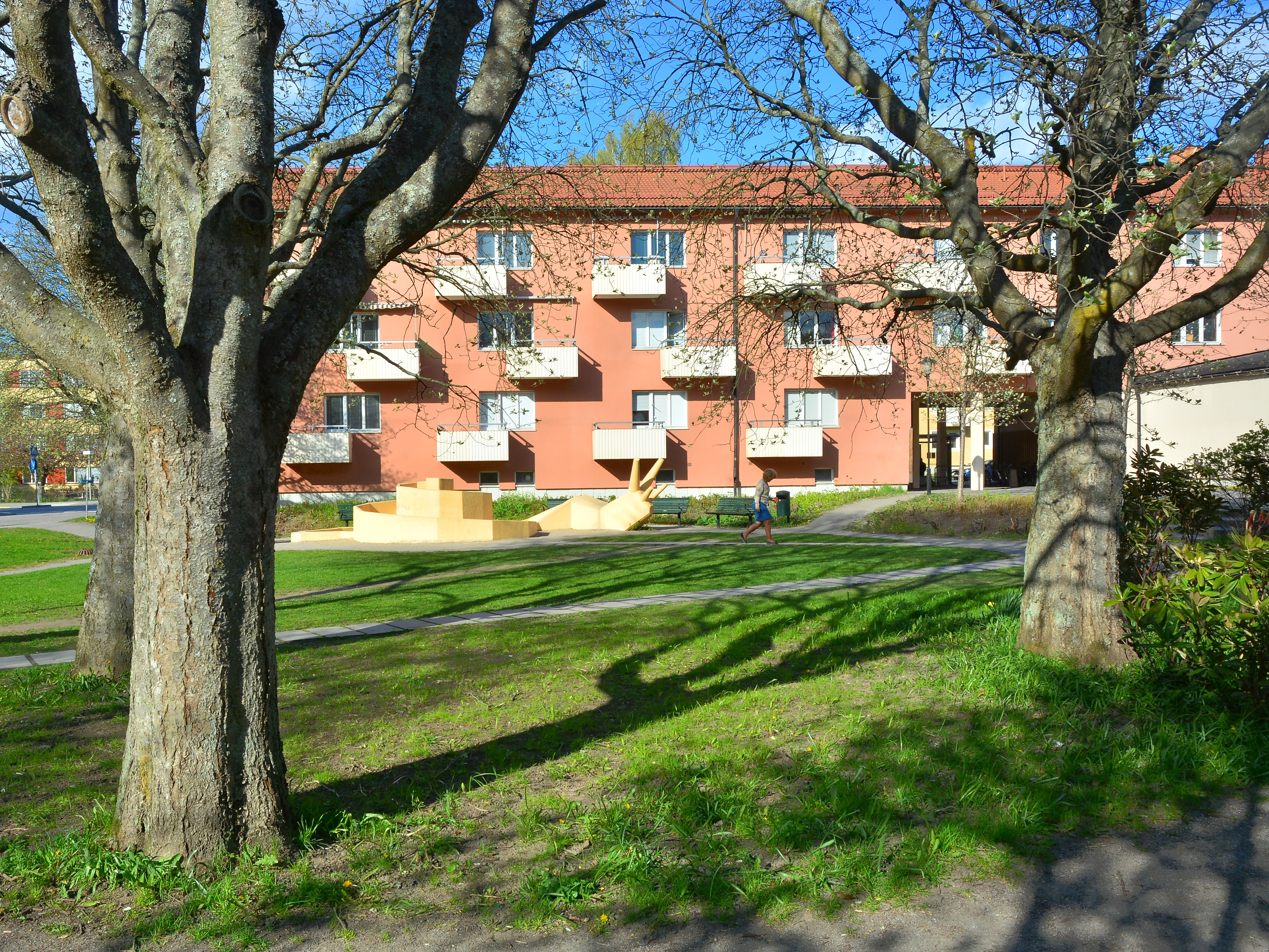 Snigelparken i Årsta i södra Stockholm.